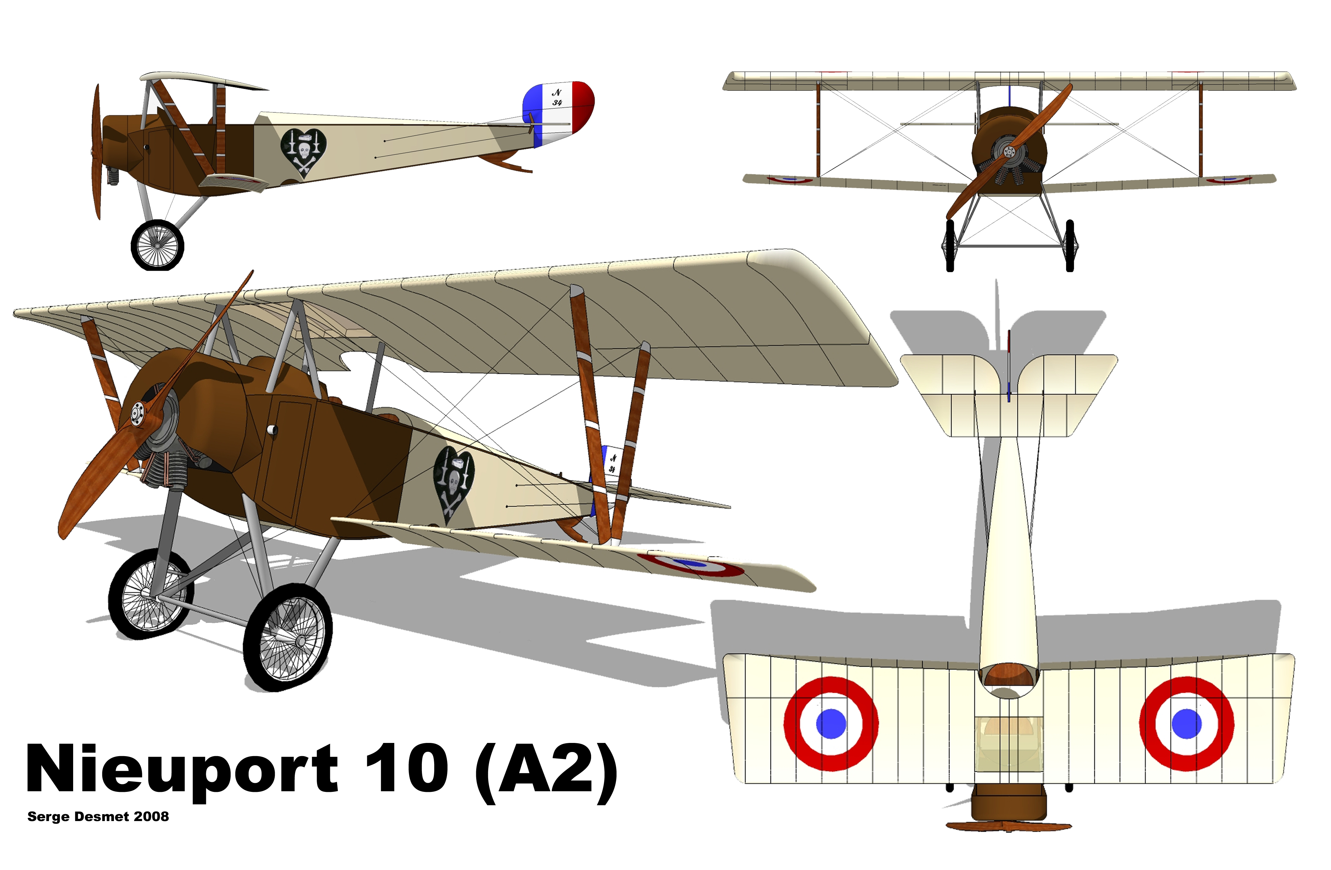 Plan 3 vues du Nieuport 10 A2